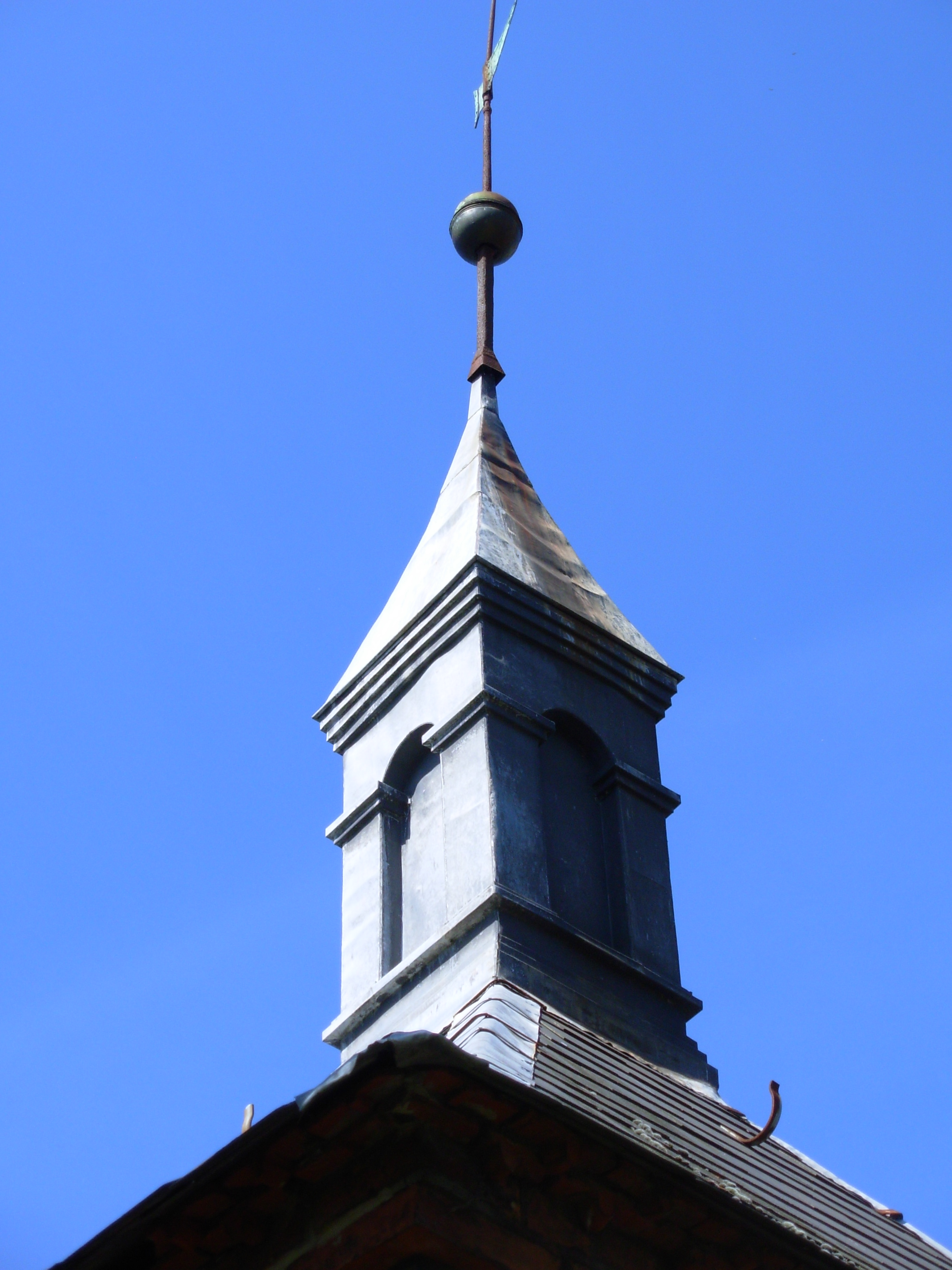 Modell der Segeberger Pyramide, Zinkblech, auf der Spitze der Rantzau-Kapelle in Segeberg.